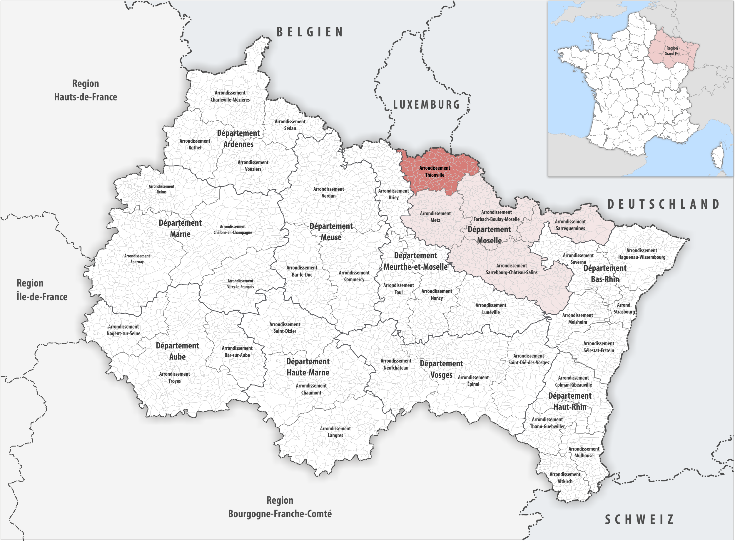 Lage des Arrondissements Thionville